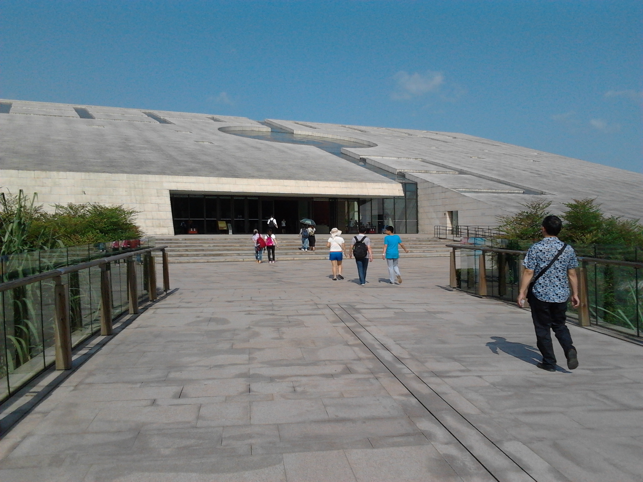 金沙遗址博物馆桥上景色